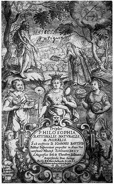 Тытульны ліст кнігі Т. Білевіча "Рацыянальная філасофія...", 1675 г.